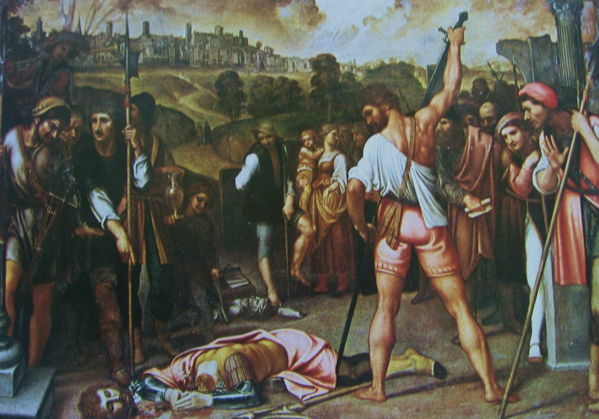 Enea Salmeggia, Martirio di S.Alessandro, esposto presso la Galleria dell'Accademia Carrara, Bergamo.